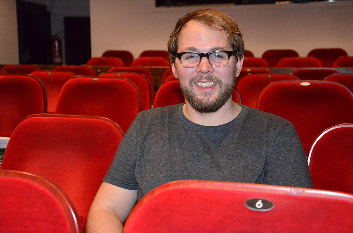 Impressionen vom und im Theater am Küchengarten (TAK) in Hannover, der Kabarettbühne im denkmalgeschützten Sockelgeschoss der 1927 unter Karl Elkart erbauten Städtischen Bäder in Hannover-Linden. Aus Zeitgründen wurde hier zunächst auf eine Einzelbeschreibung der Fotografien verzichtet; Details können Sie jedoch auch ohne Ihre eigene Arbeit schon jetzt aus dem jeweiligen Dateinamen entnehmen ...